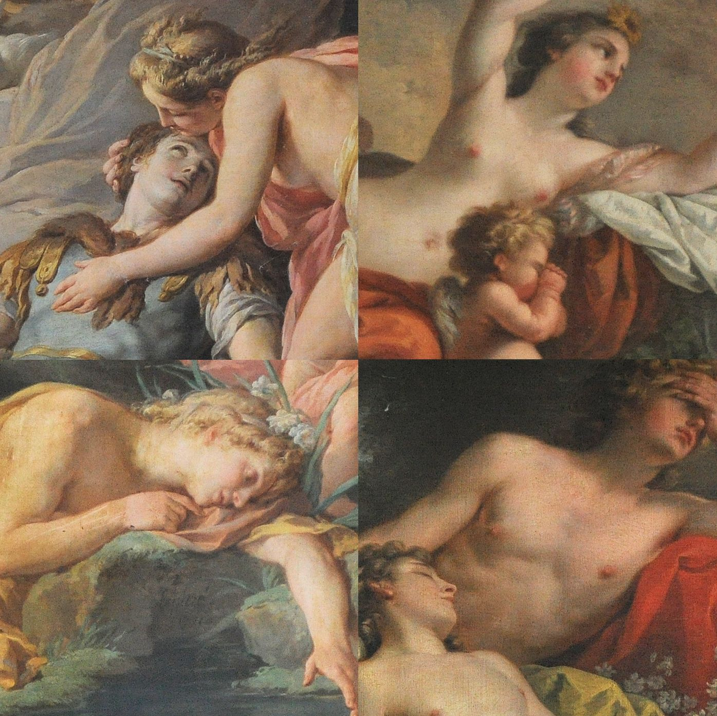 Les Métamorphoses - Montage de détails